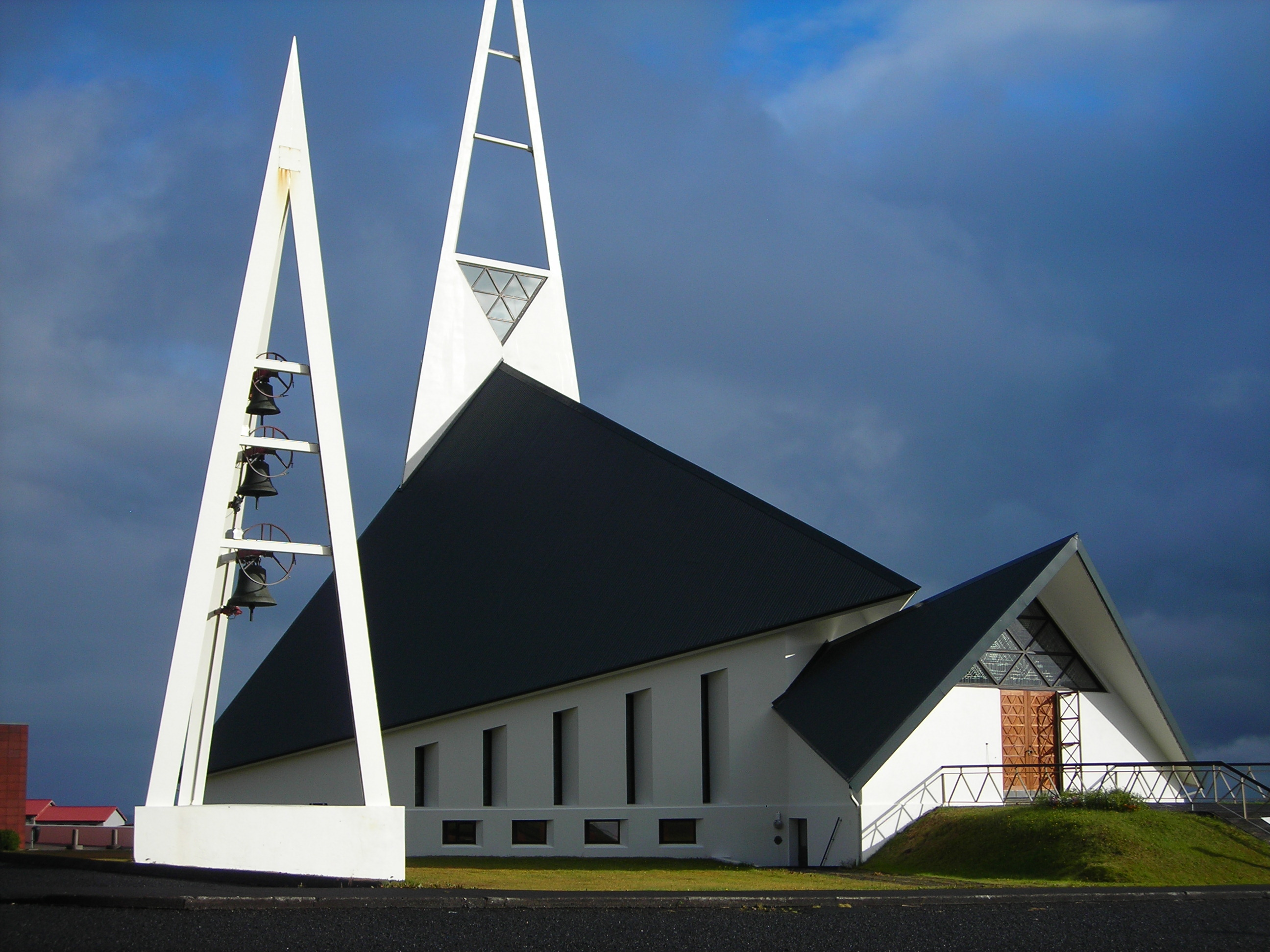 Chiesa a Ólafsvík